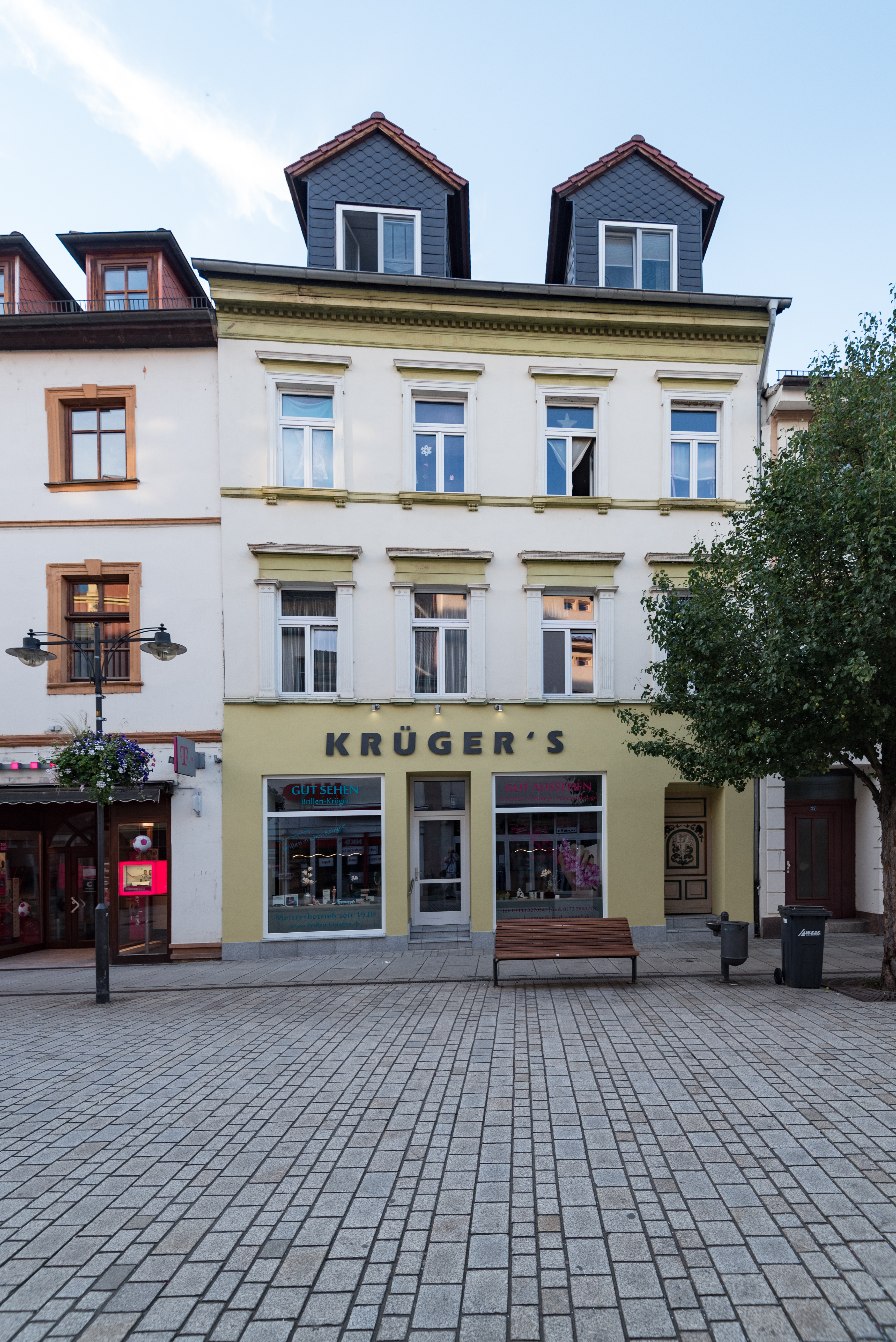 Weißenfels, Jüdenstraße 29